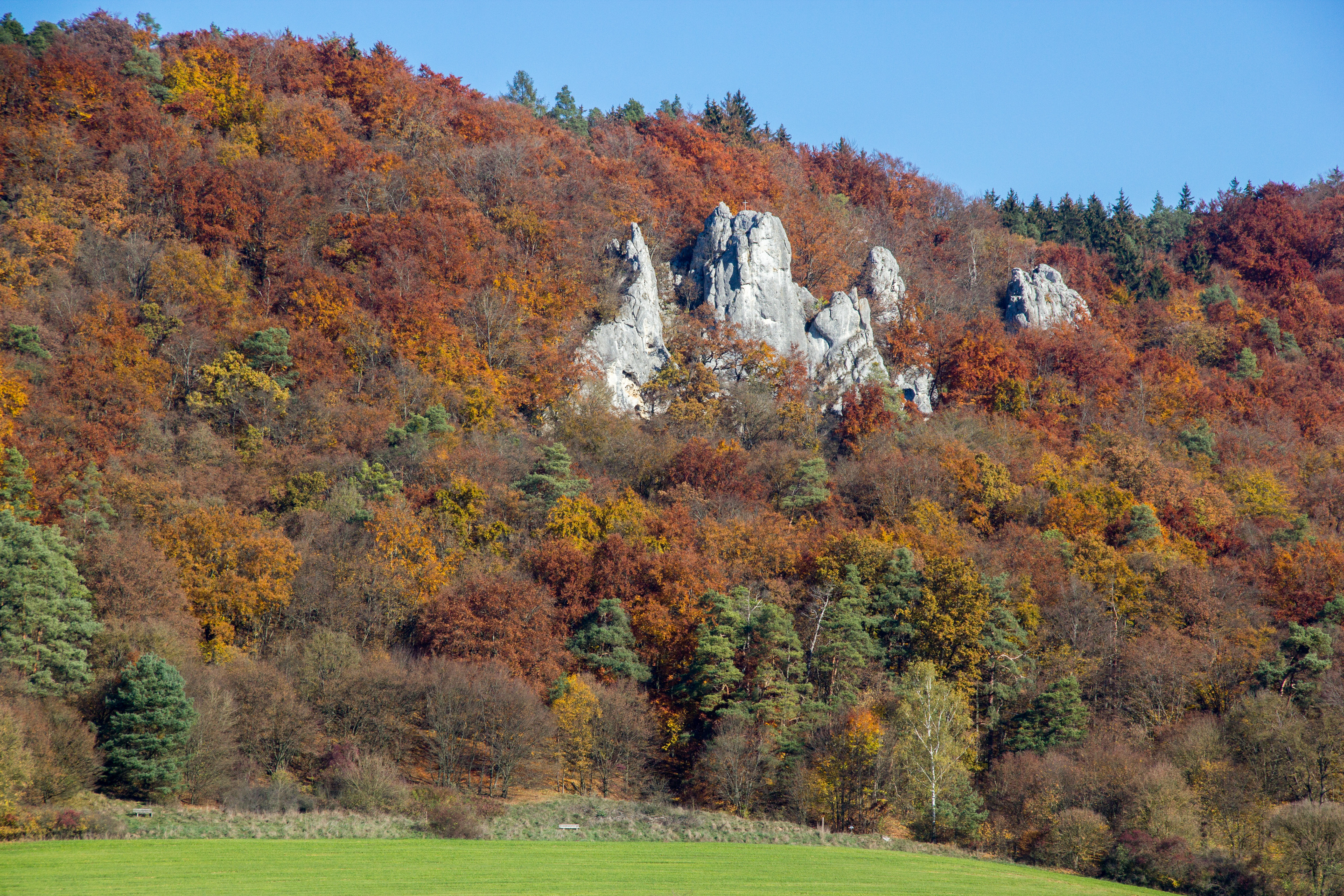 Felsgruppe, Wellheim, Geotop, Aicha